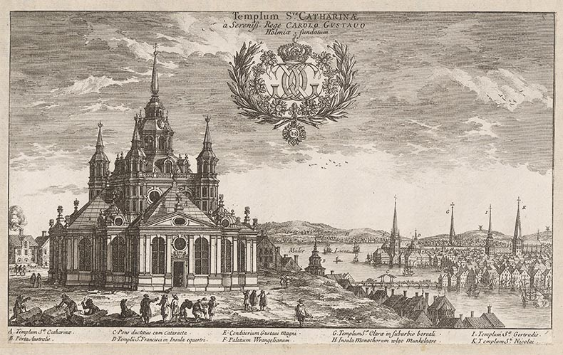 Templum S:tae Catharinae a Sereniss. Rege Carolo Gustavo Holmiae fundatum